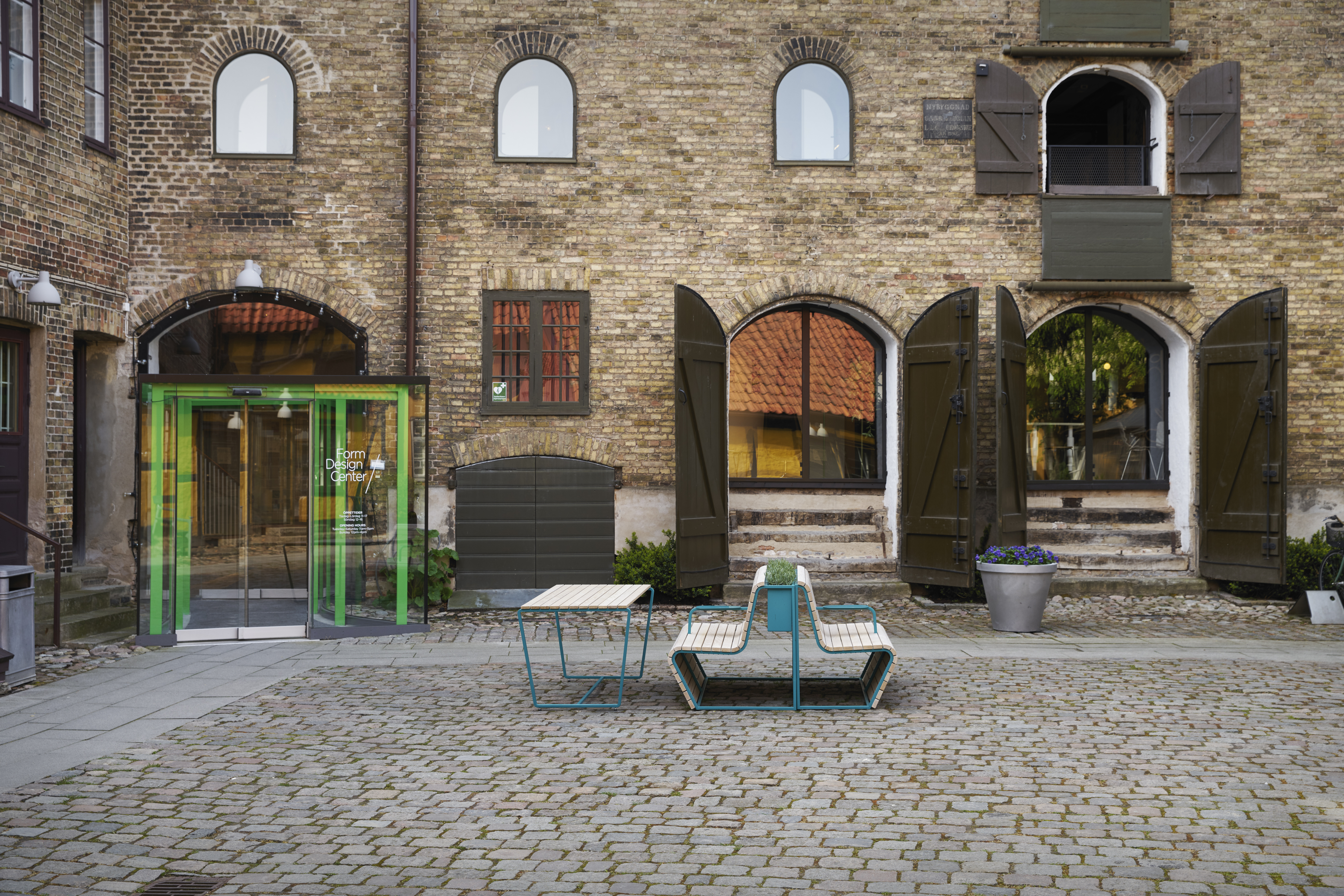 Exteriör